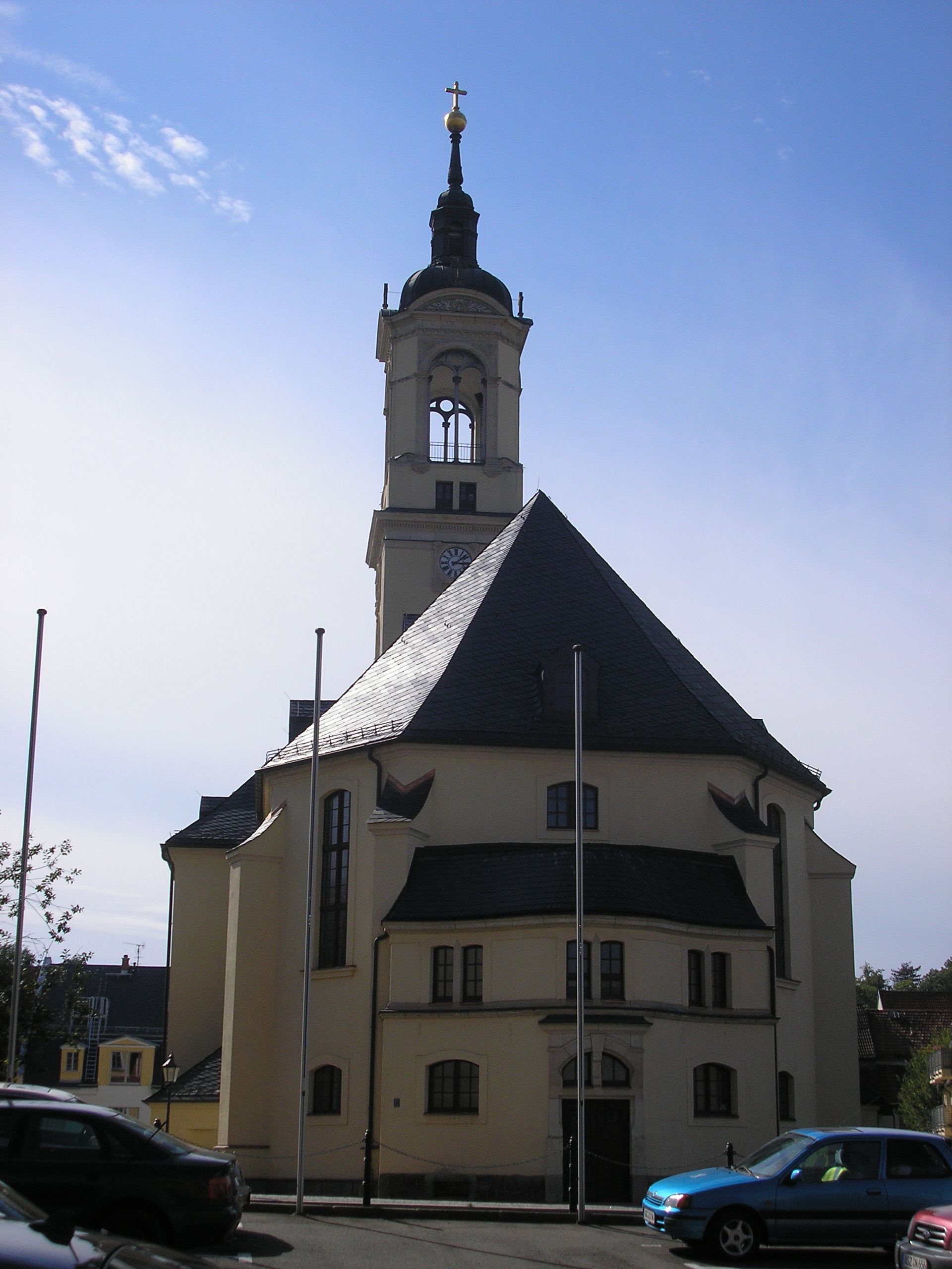 Die Rückansicht der Stadtkirche in Werdau (Sachsen).